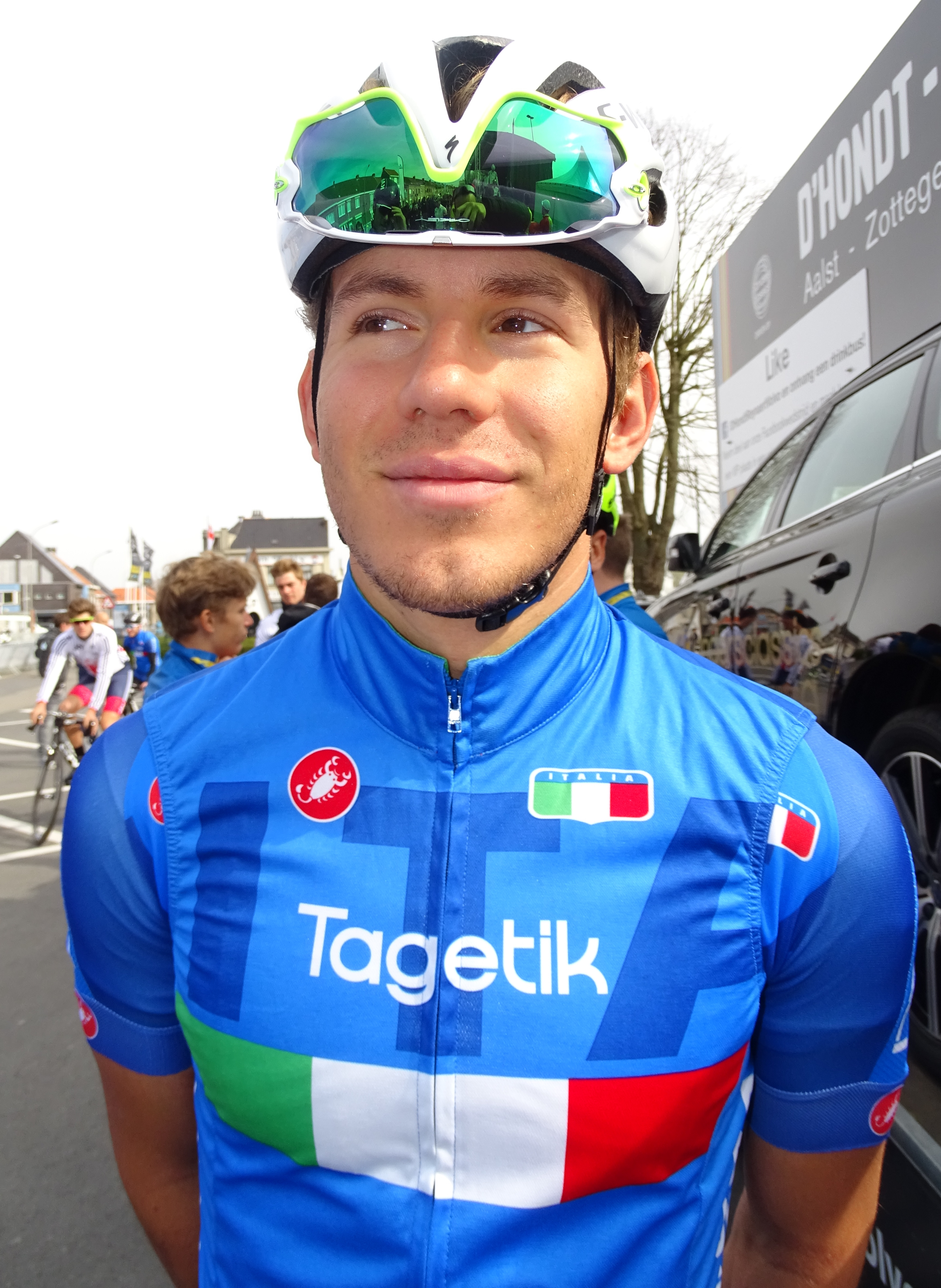 Reportage réalisé le samedi 9 avril à l'occasion du départ et de l'arrivée du Tour des Flandres espoirs 2016 à Audenarde, Belgique.